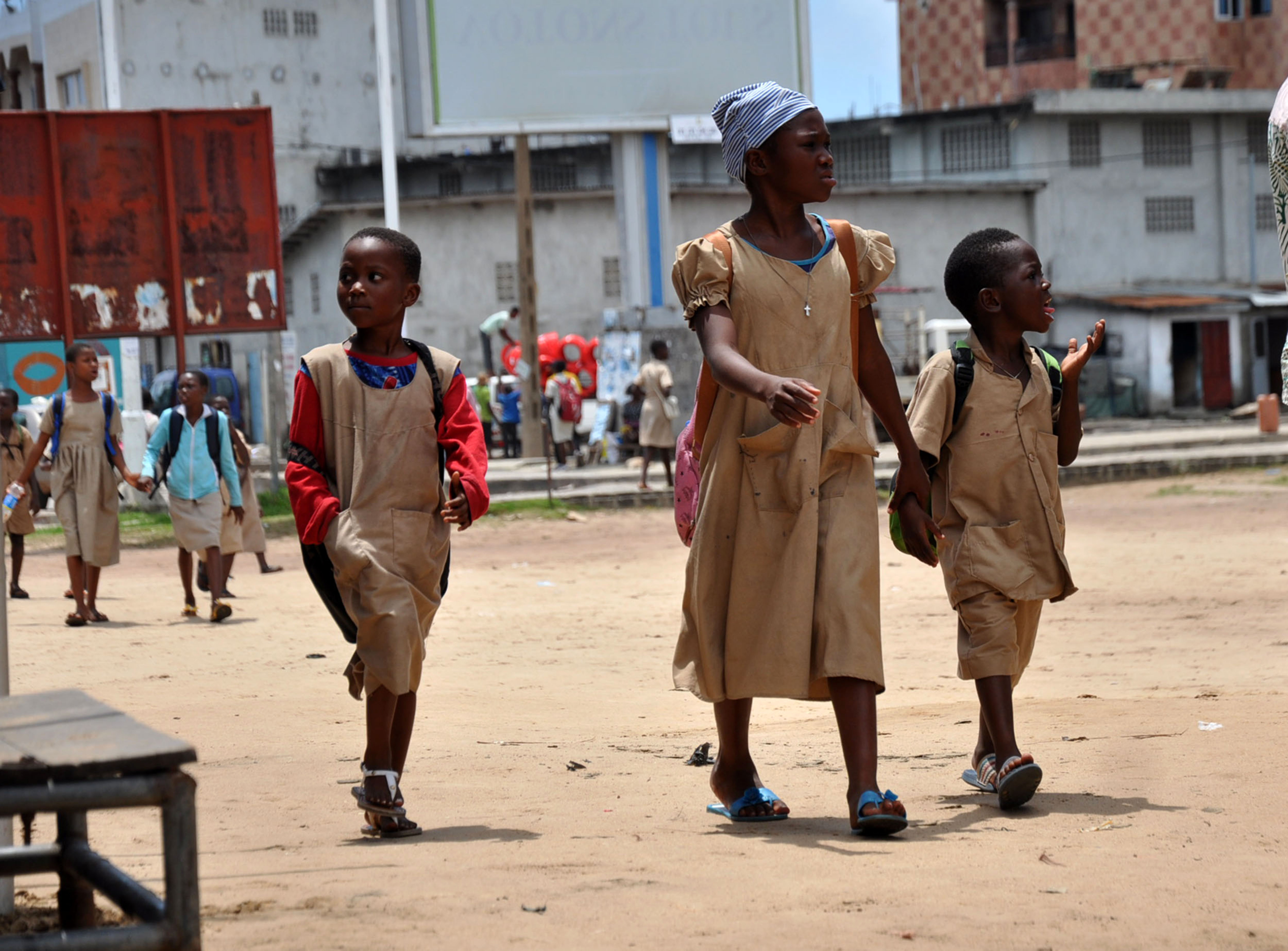 on the way to a better education which will transform the future in a better world This is an image with the theme "Africa on the Move or Transport" from: Benin